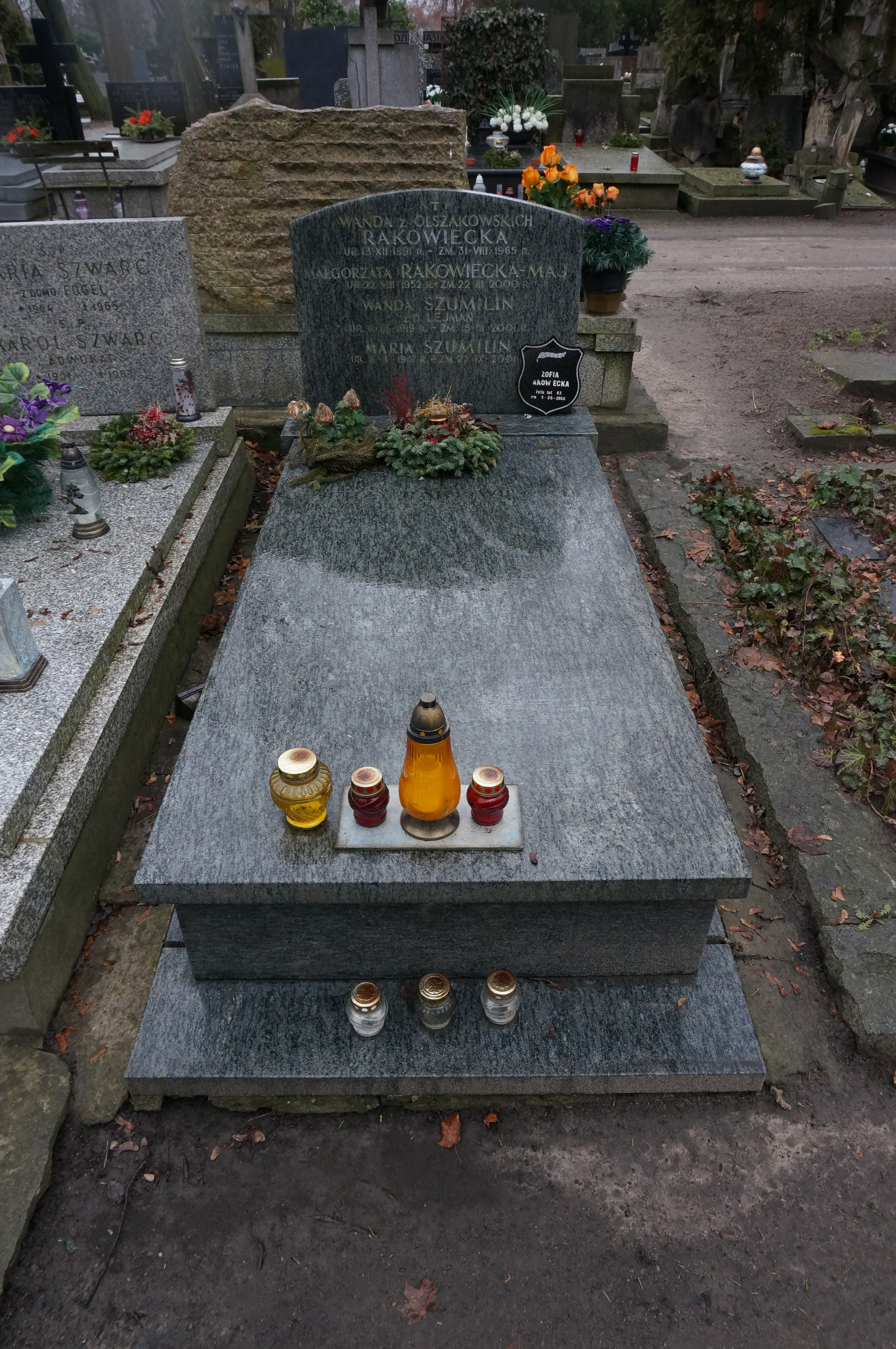 Grób Jerzego Rakowieckiego na Cmentarzu Powązkowskim (kwatera 62, rząd 5, grób 27)